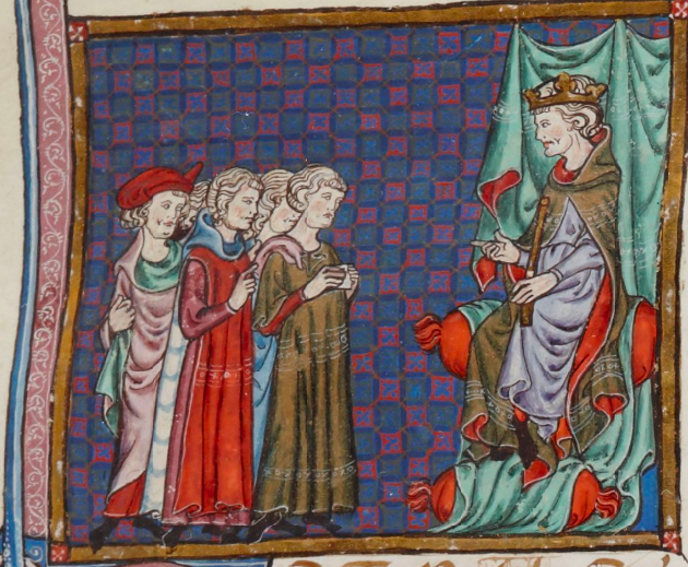 Audience u Petra III. Aragonského